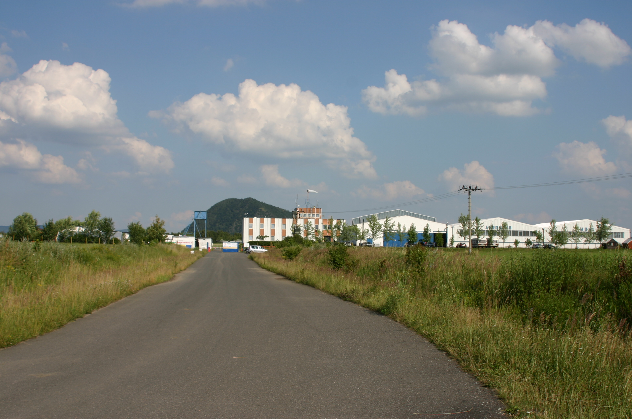 Letiště Most, Starý Most čp. 661.